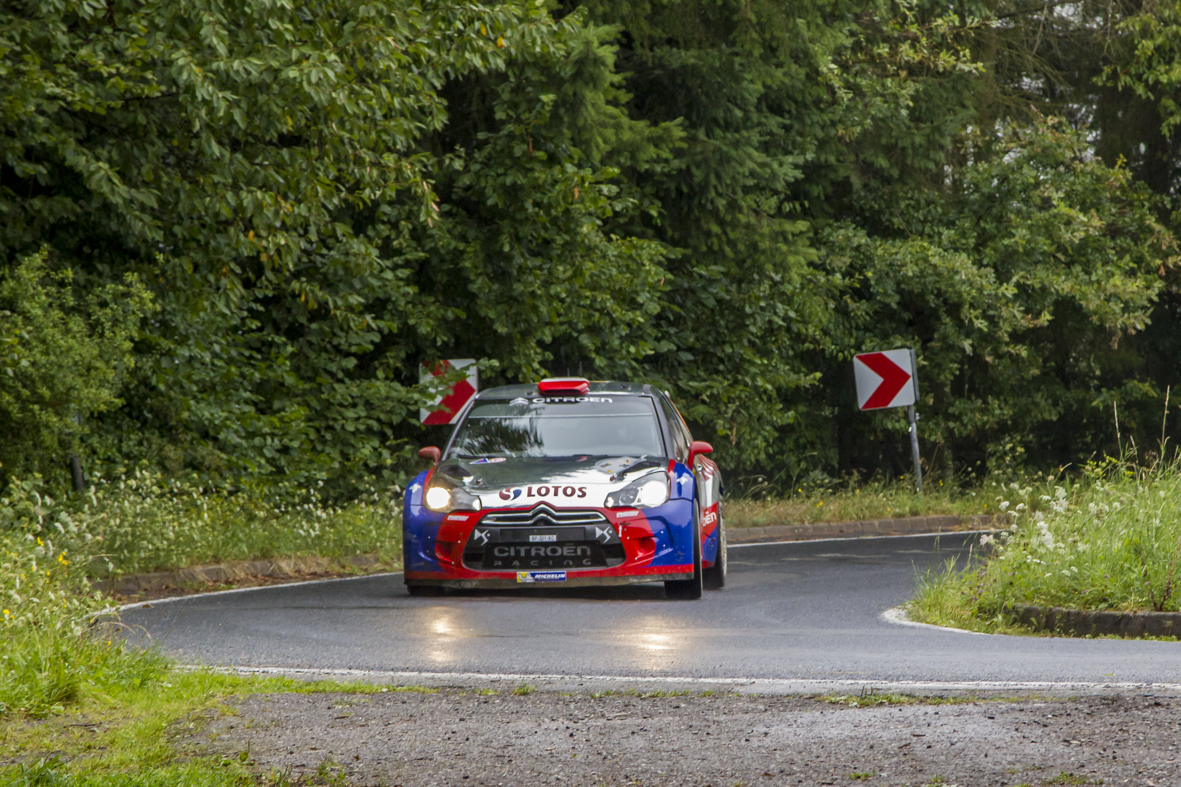 ROBERT KUBICA